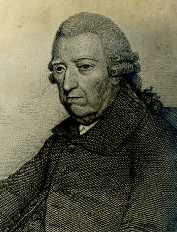 Francis Maseres est un avocat, un juge, un mathématicien et un historien britannique né à Londres, le 15 décembre 1731 et décédé le 19 mai 1824 à Reigate en Angleterre. Baron puîné de la Cour de l’échiquier, il fut procureur général de la Province de Québec et membre de la Société royale de Londres.